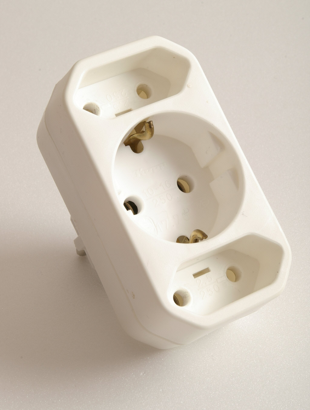 Mehrfachsteckdose